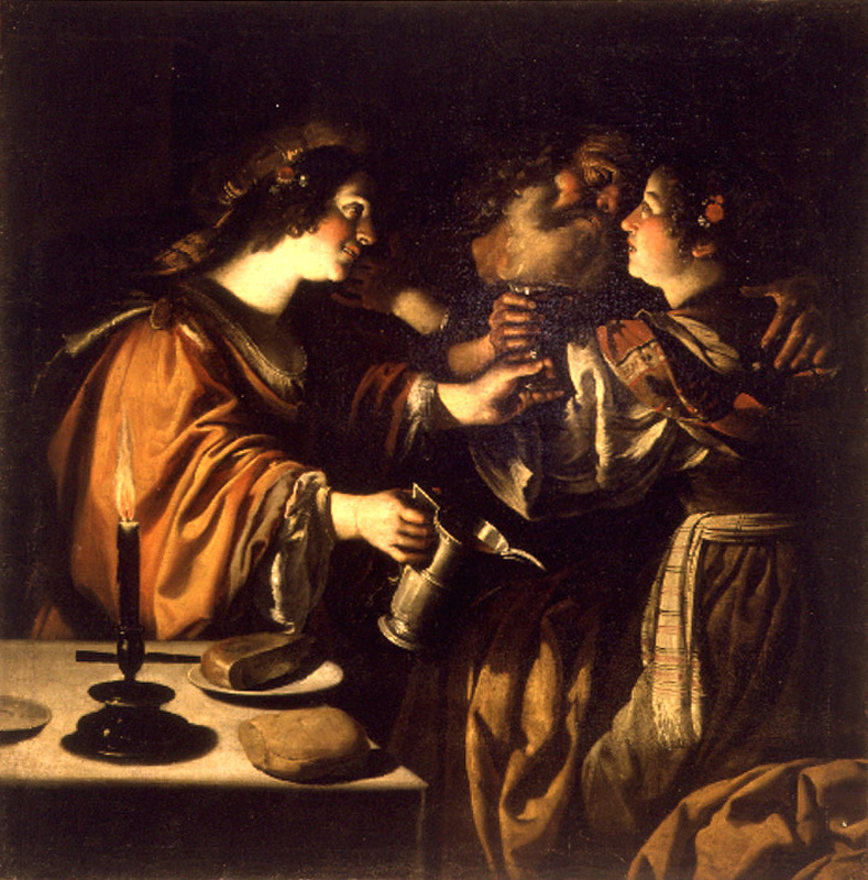 La obra representa a las hijas de Lot emborrachando a su padre para poder mantener relaciones sexuales con él y lograr de ese modo descendencia.